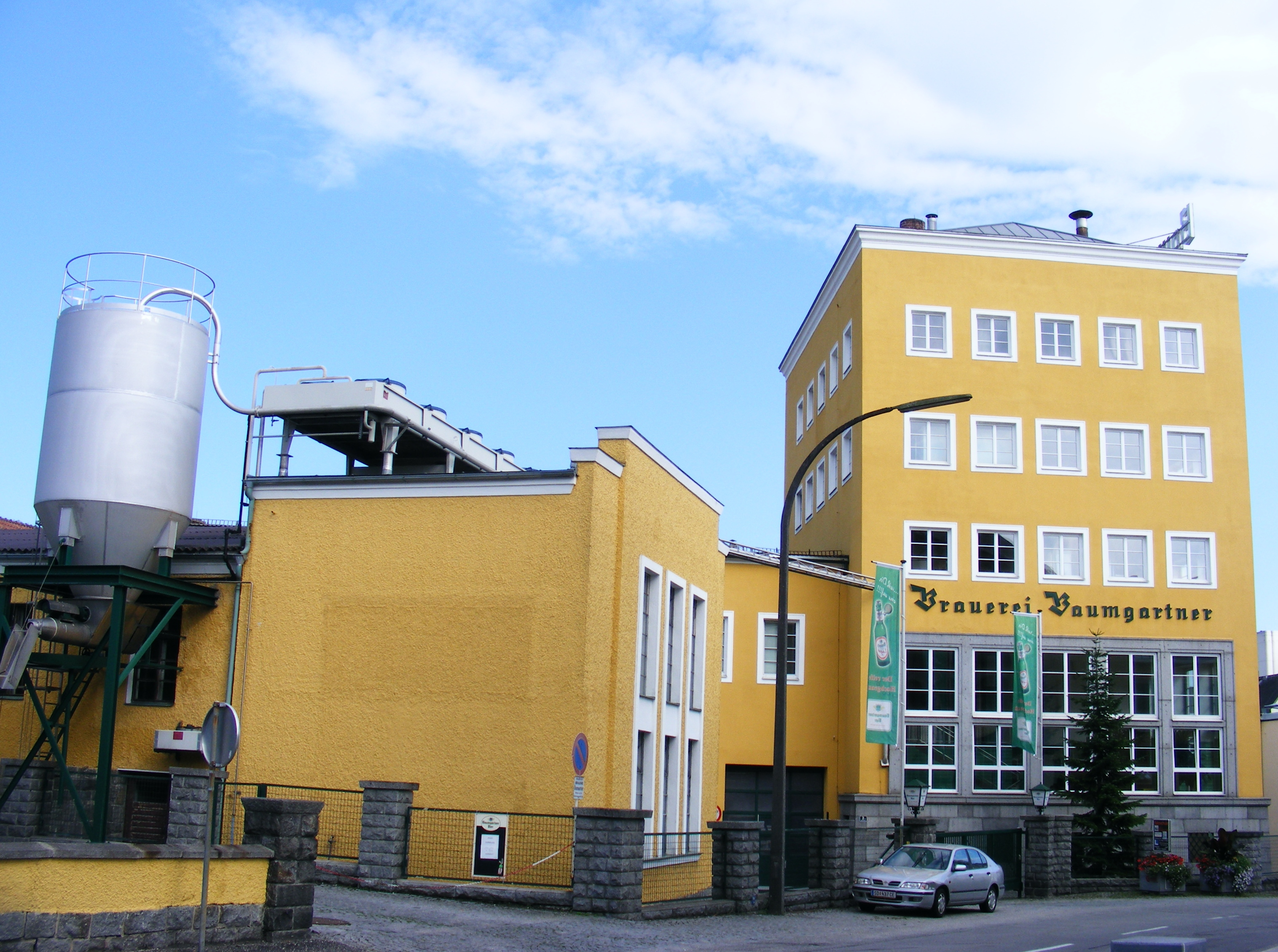 A-4780 Schärding (Oberösterreich) - Brauerei Jos. Baumgartner AG